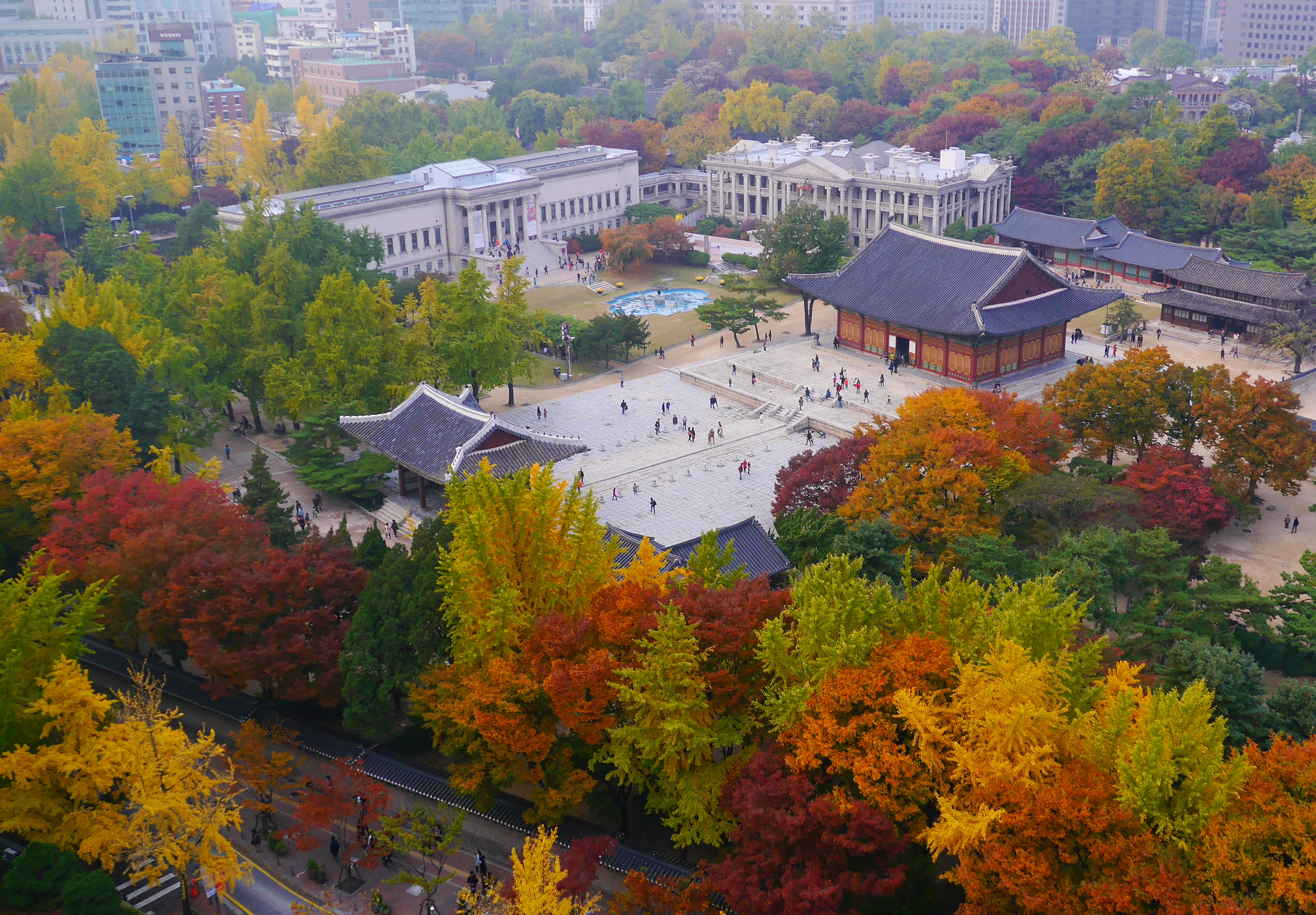 Deoksugung